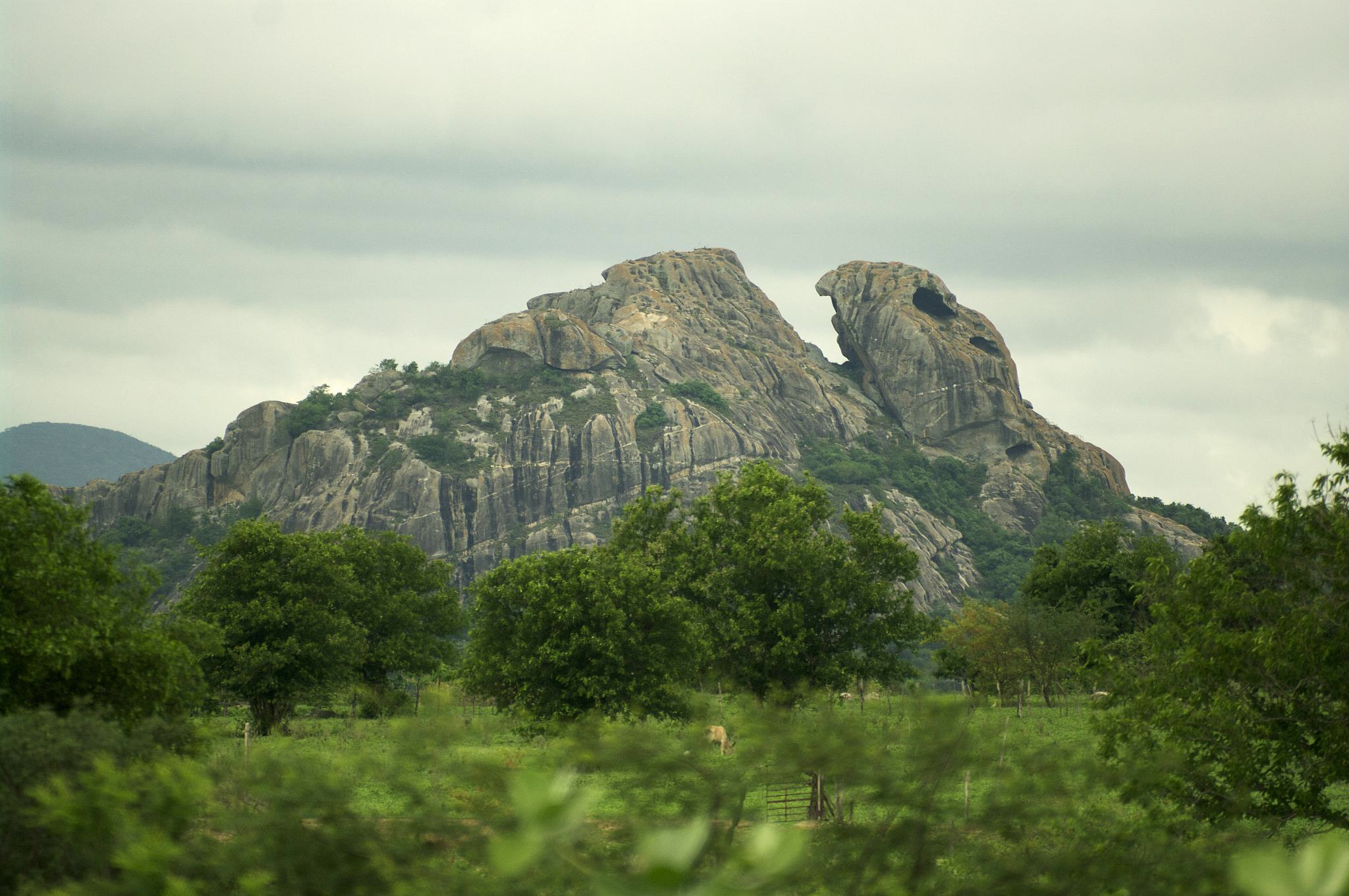 Quixadá (1)